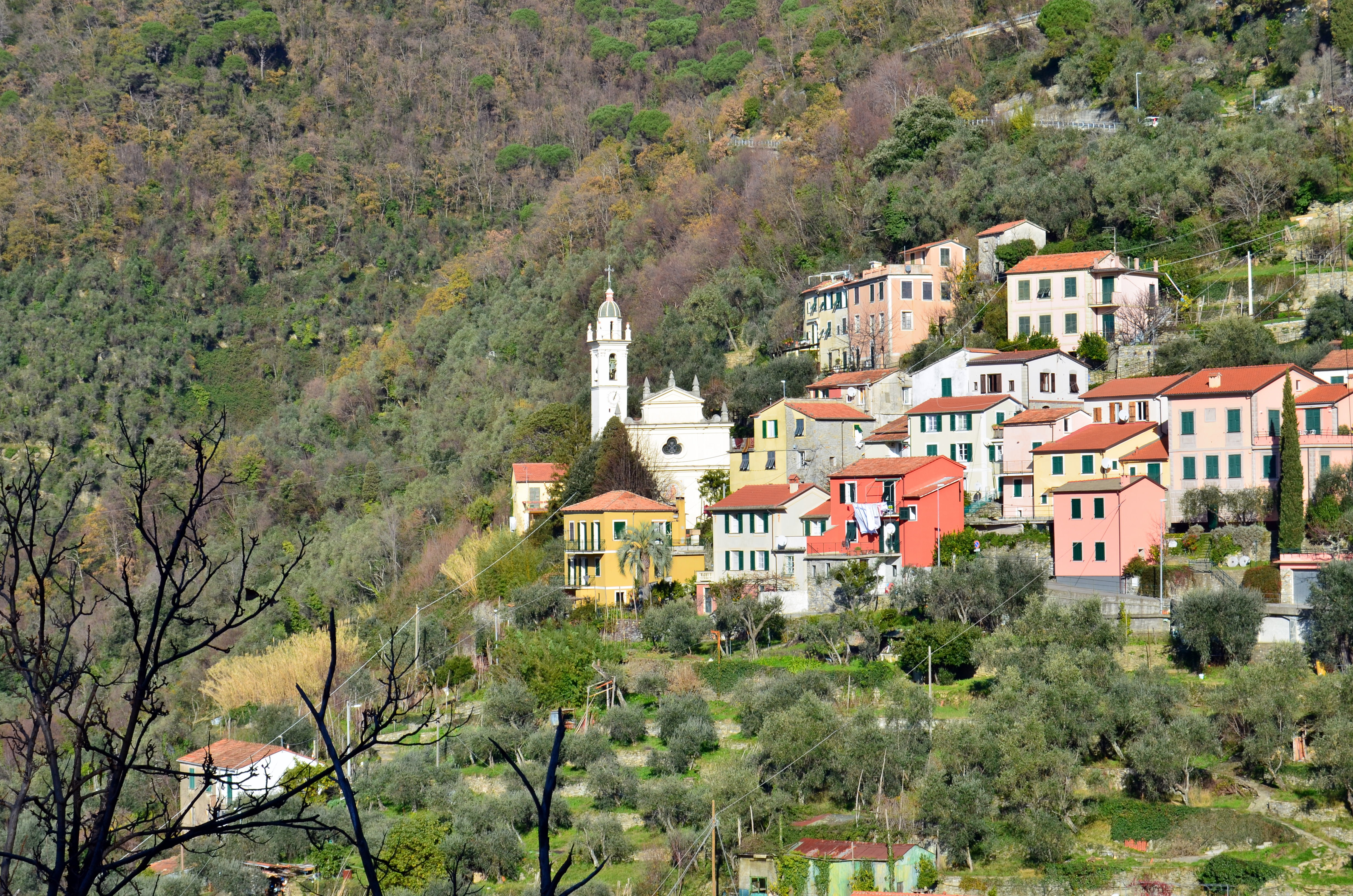 Semorile, Zoagli, Liguria, Italia